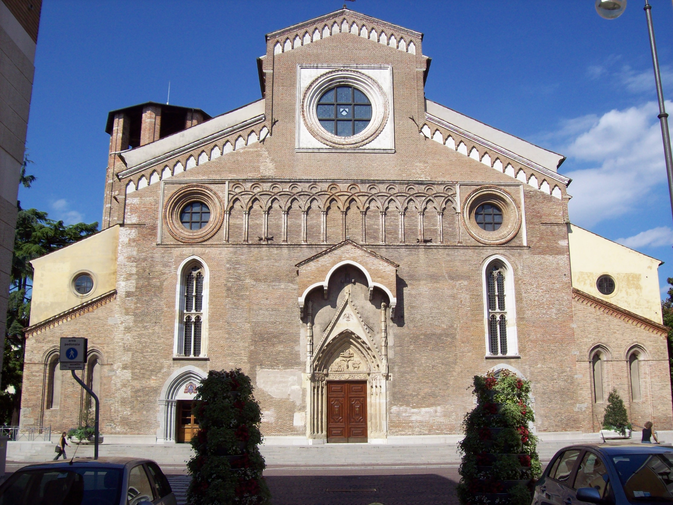 Duomo di Udine - facciata